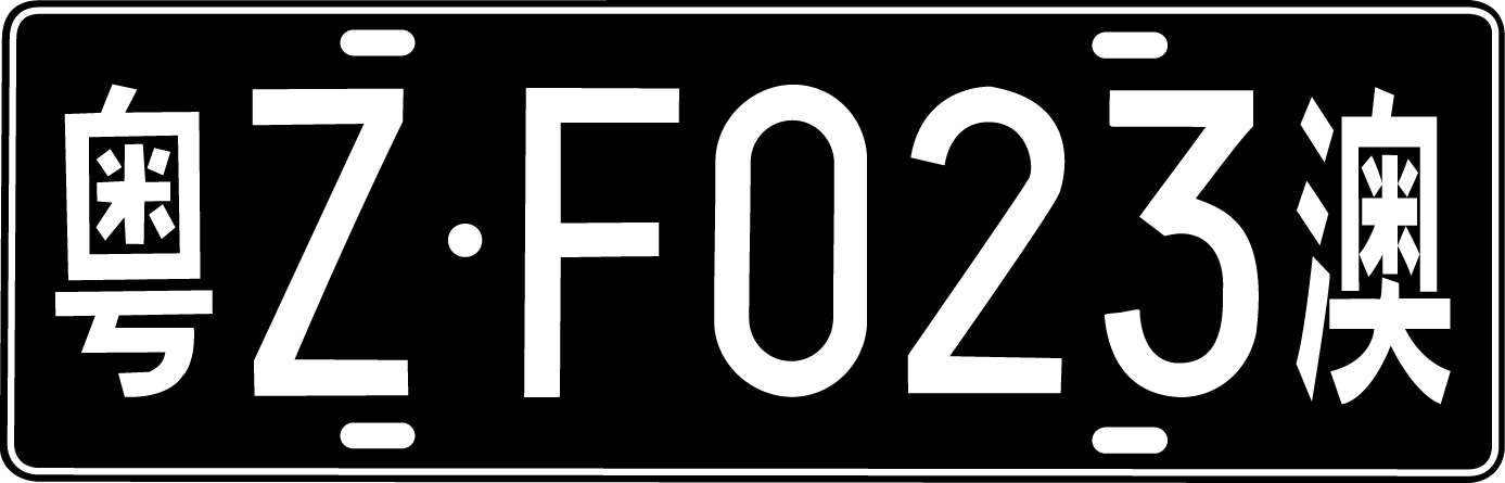 C.6 港澳入出境车号牌 C.6.2 澳门入出境车号牌